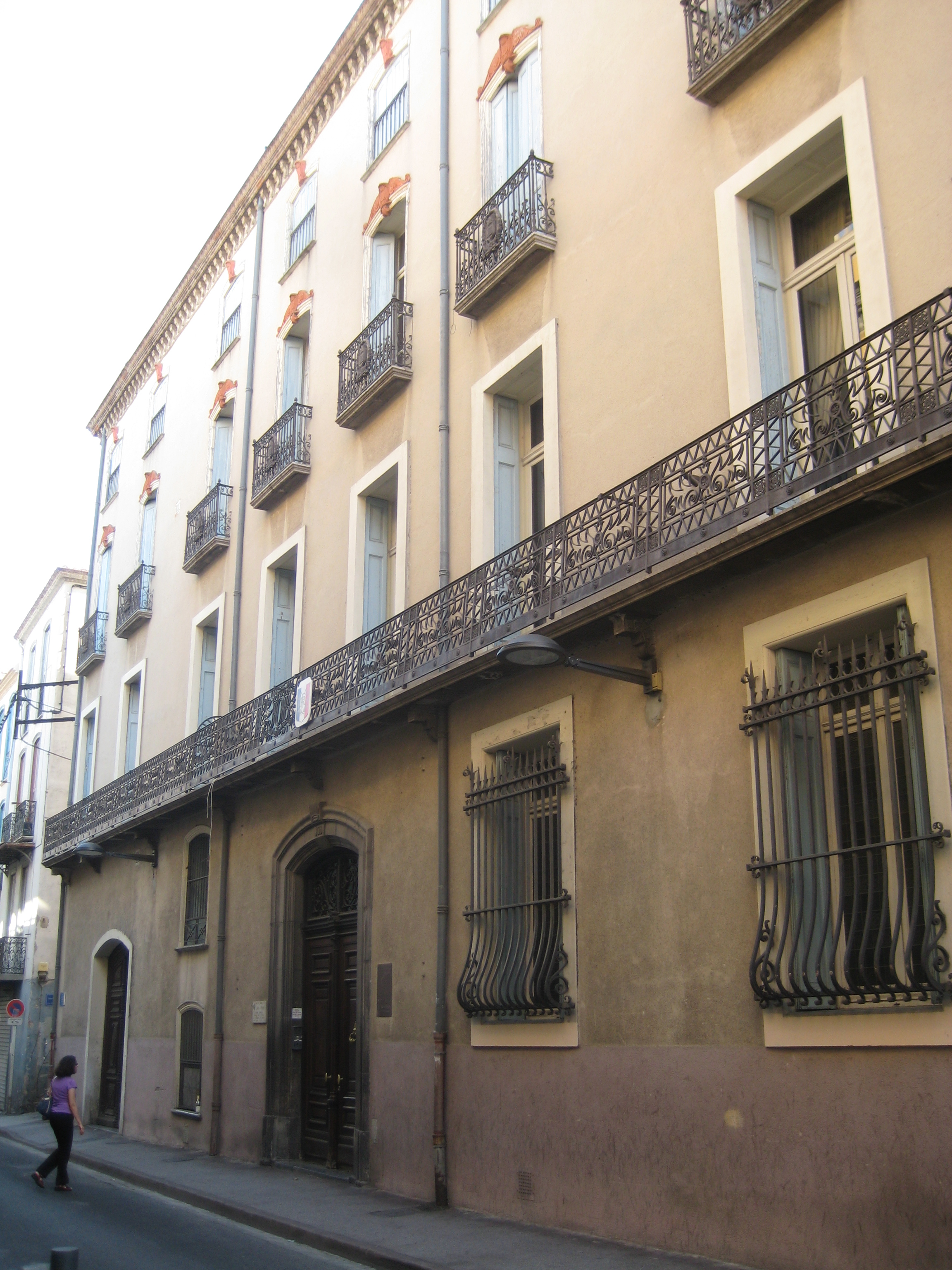 Hôtel Pams, à Perpignan (France) This building is en partie classé, en partie inscrit au titre des Monuments Historiques. .